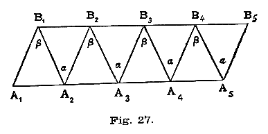 Illustrazioni da La geometria non-euclidea, by Roberto Bonola, Zanichelli 1905